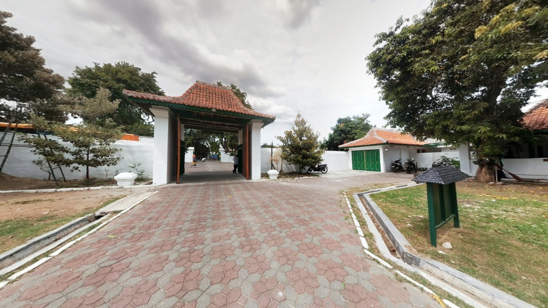 Keraton-kacirebonan